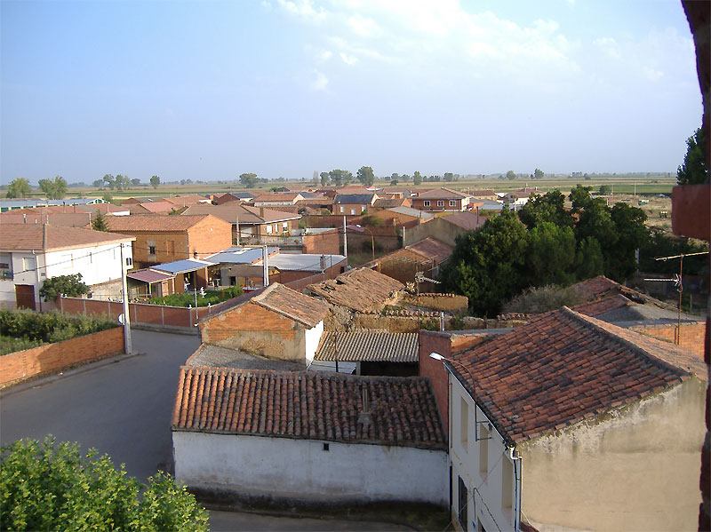 Vista de Grisuela del Páramo desde el campanario de su iglesia.